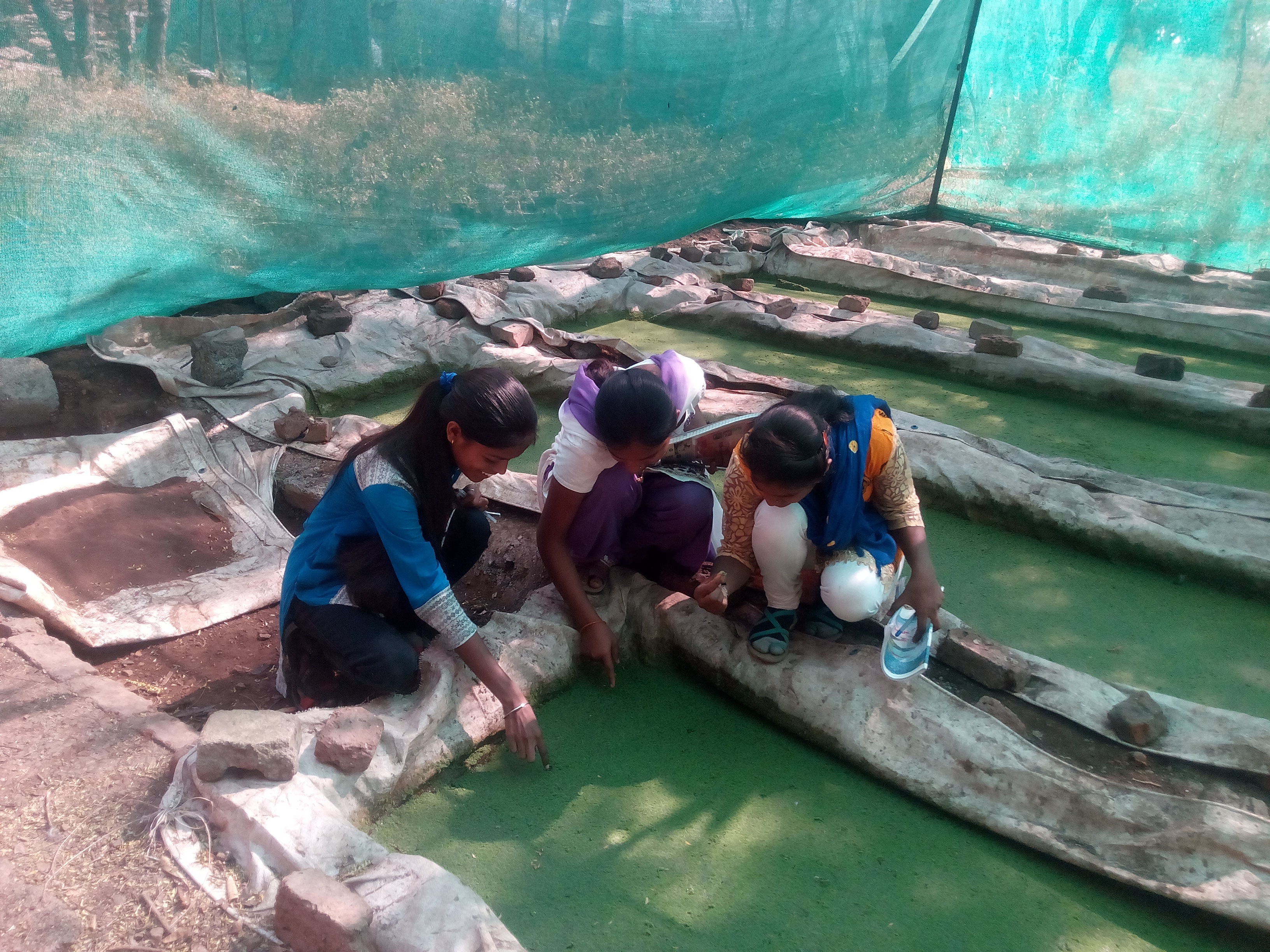 एझोला बेड तयार करताना